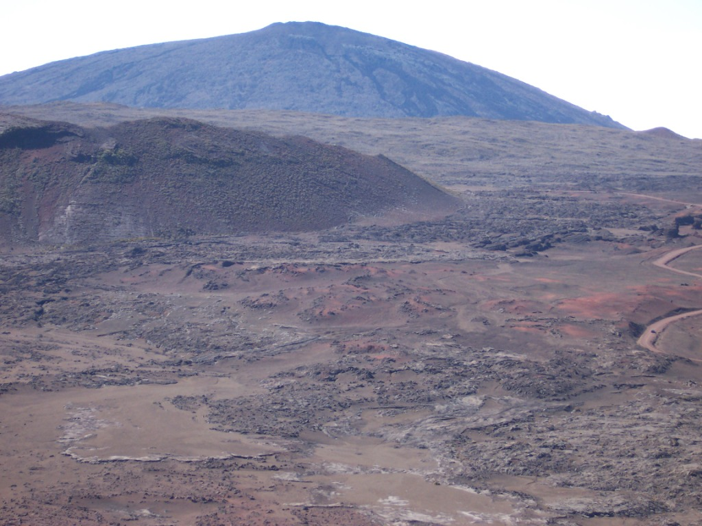 Piton de la Fournaise volcano as seen from Oratoire Sainte Thérèse Photo: B.navez - 01 SEP 2005 - Réunion island